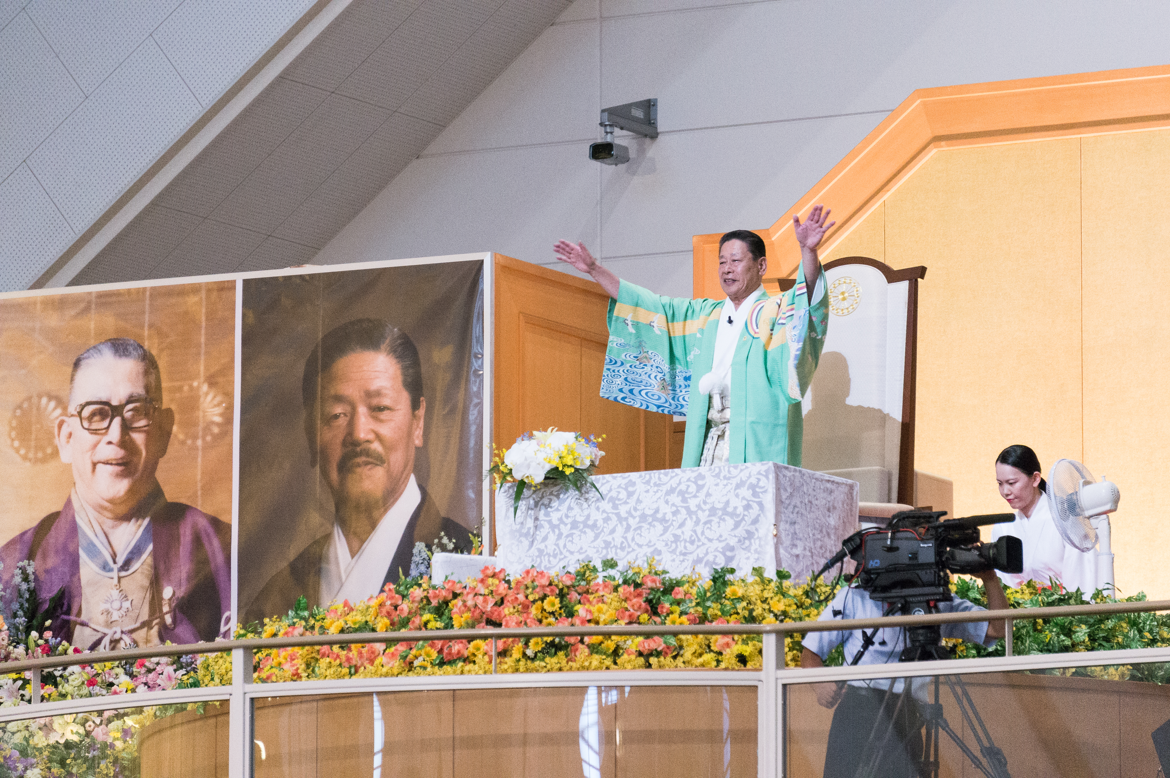 世界真光文明教団の第三代教え主「関口勝利 」